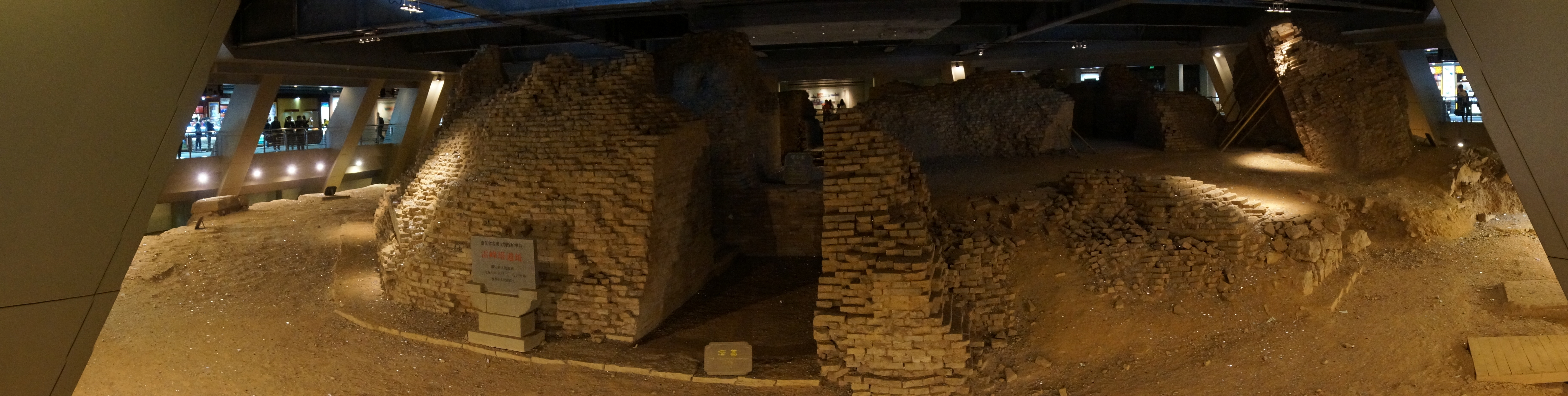 雷峰塔遗址全景。